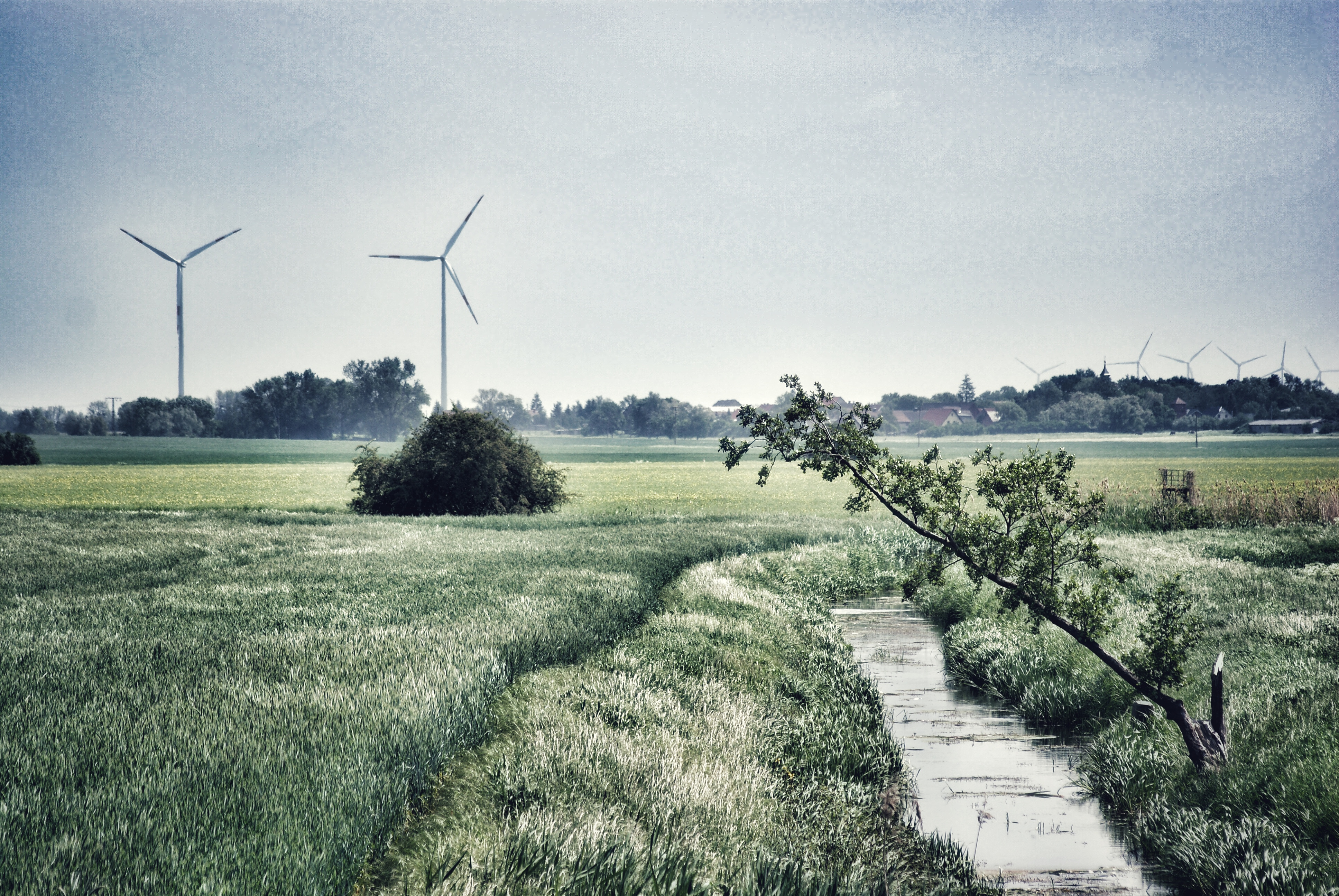 ein Graben bei Woltersdorf